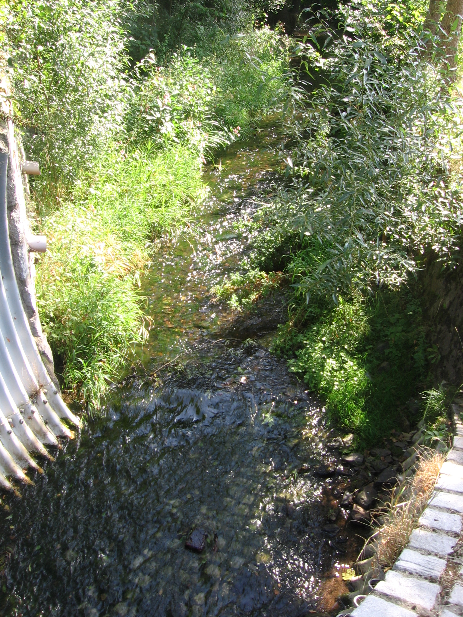 Lewin Kłodzki, strumień Bystra (Klikawa) przy niedaleko wiaduktu kolejowego